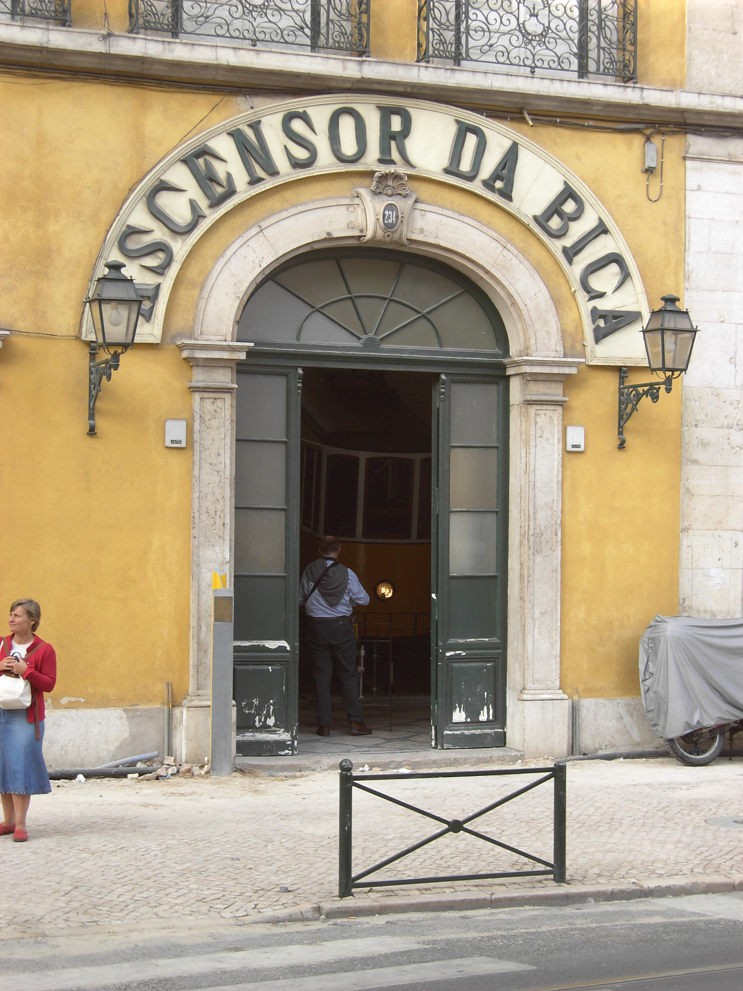 Lisboa-Ascensor da Bica